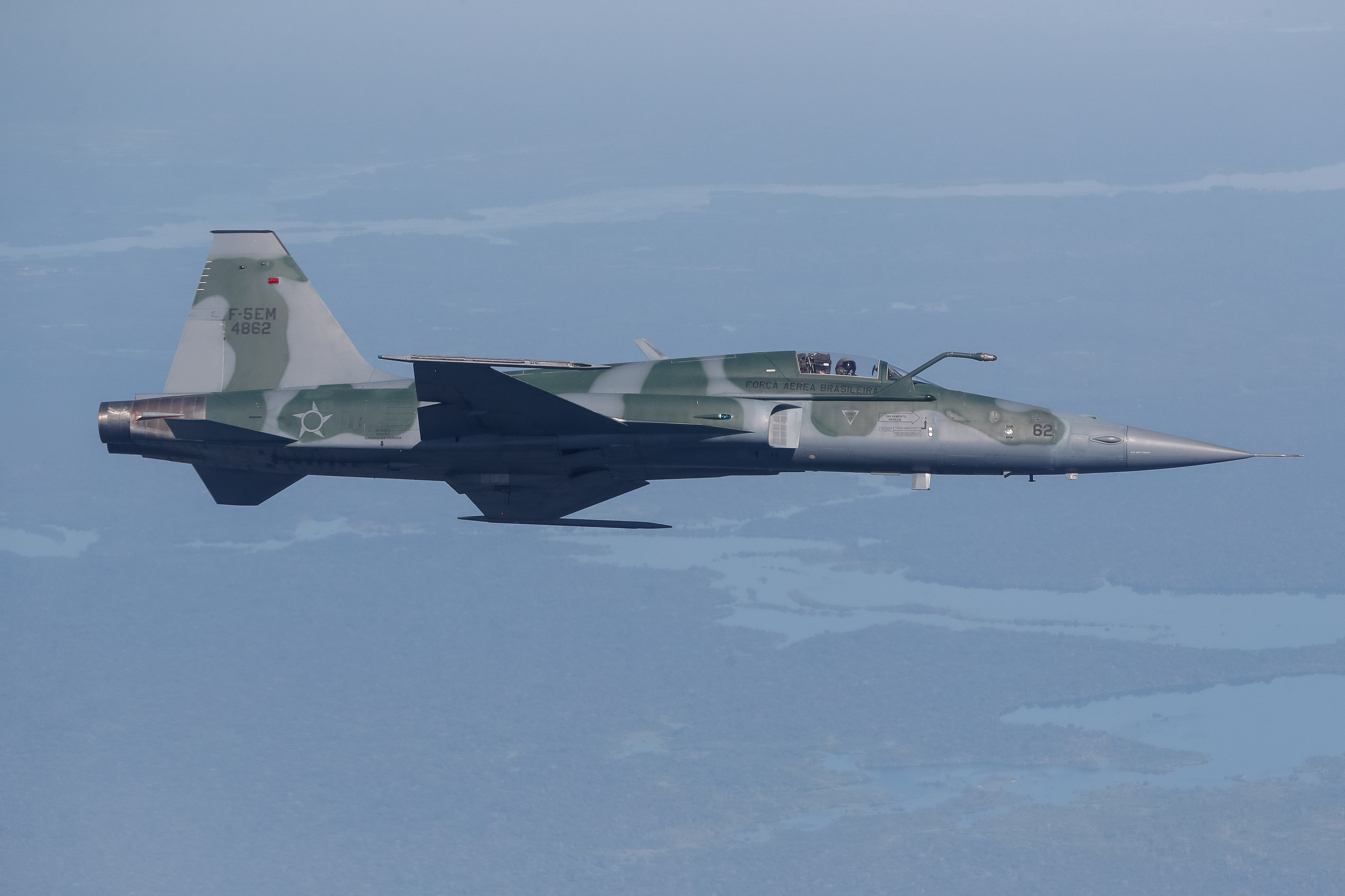 Caça F-5 da FAB acompanha o Avião Presidencial em Manaus.